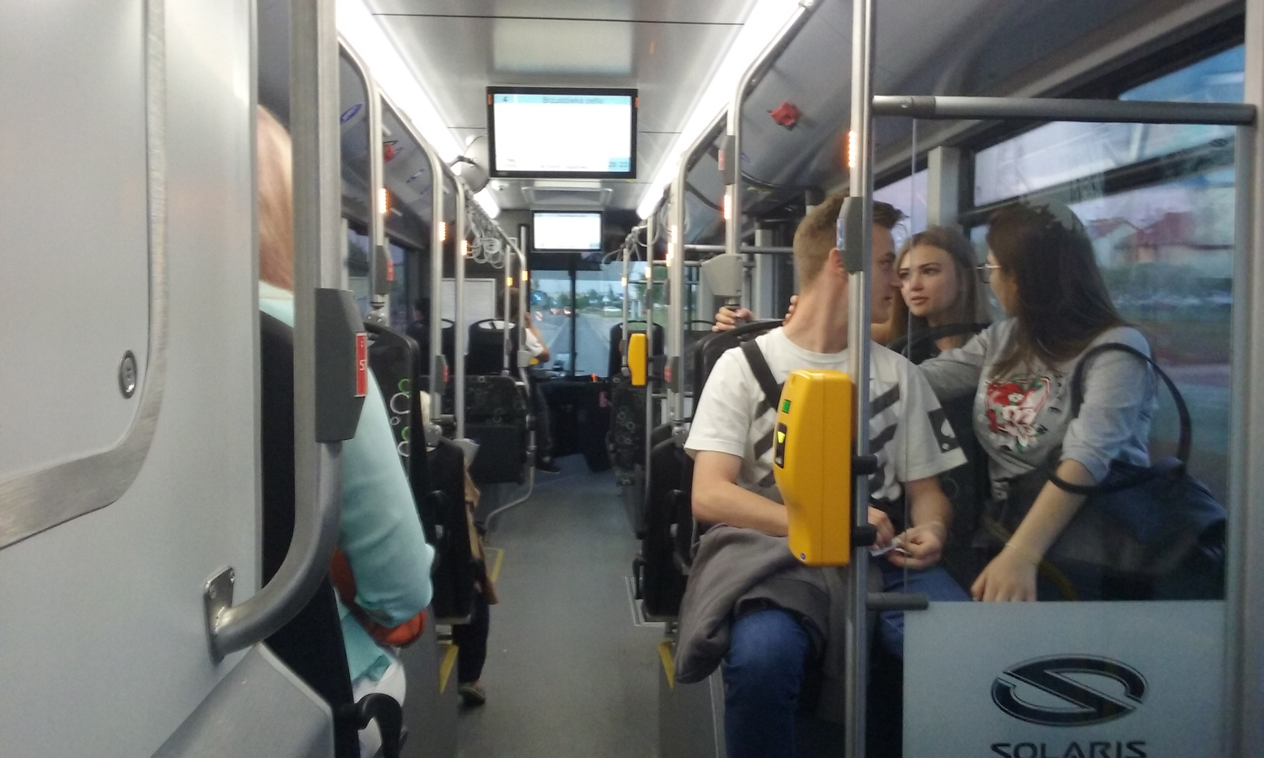 Wnętrze autobusu Solaris Urbino 12 Hybrid zakupionych przez PiS dla MZK w Tomaszowie Mazowieckim w 2017 roku